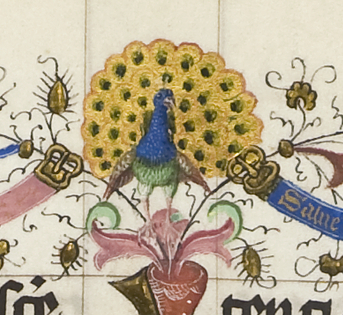 Hs. 400, f. 99r. Marges: Pauw.